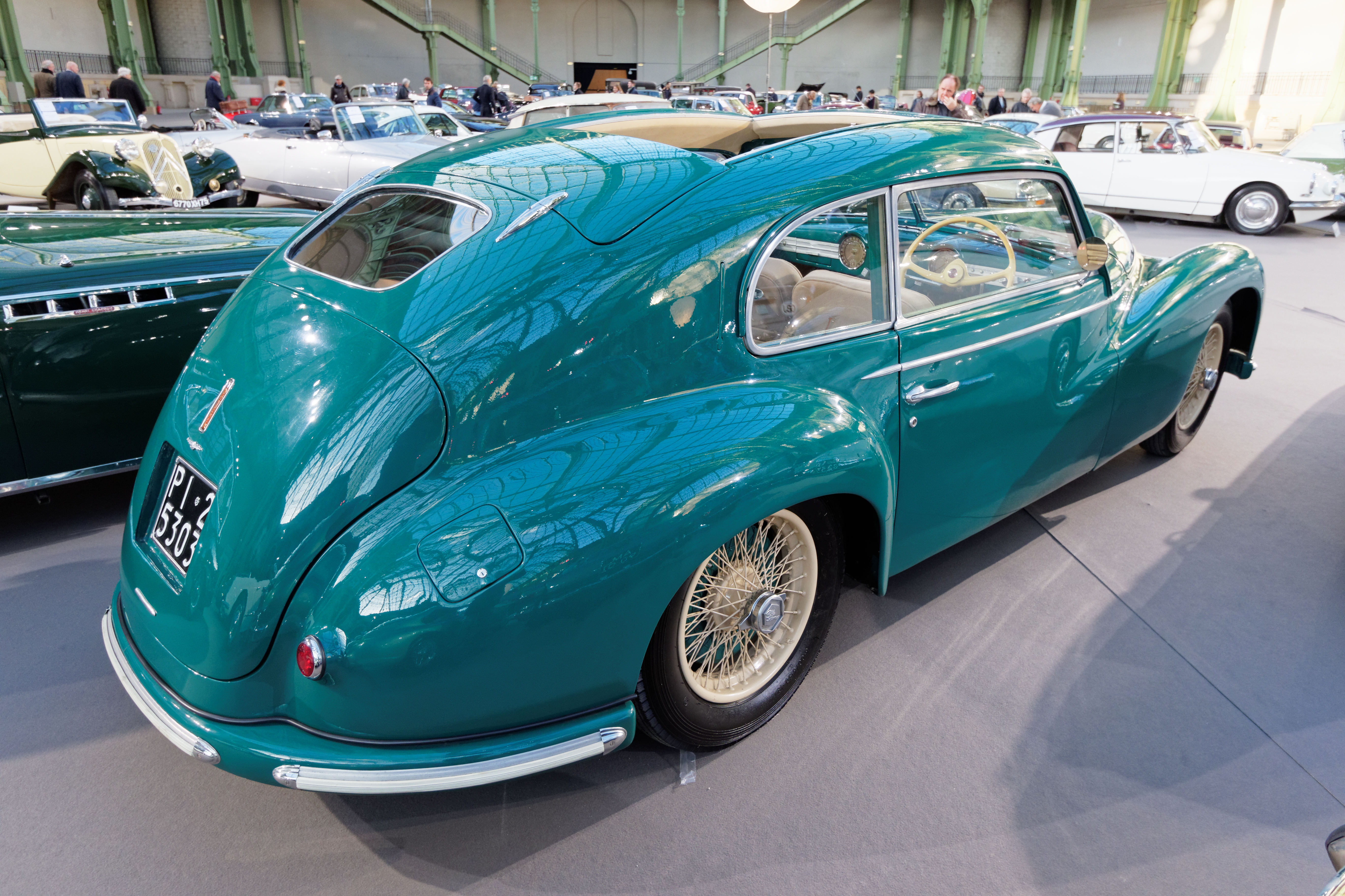 Paris - Bonhams 2015 - Alfa Romeo 6C 2500S Freccia d'Oro Sports Saloon - 1949,.Un des véhicules présenté lors de la vente aux enchères Bonhams 2015 au Grand Palais de Paris.